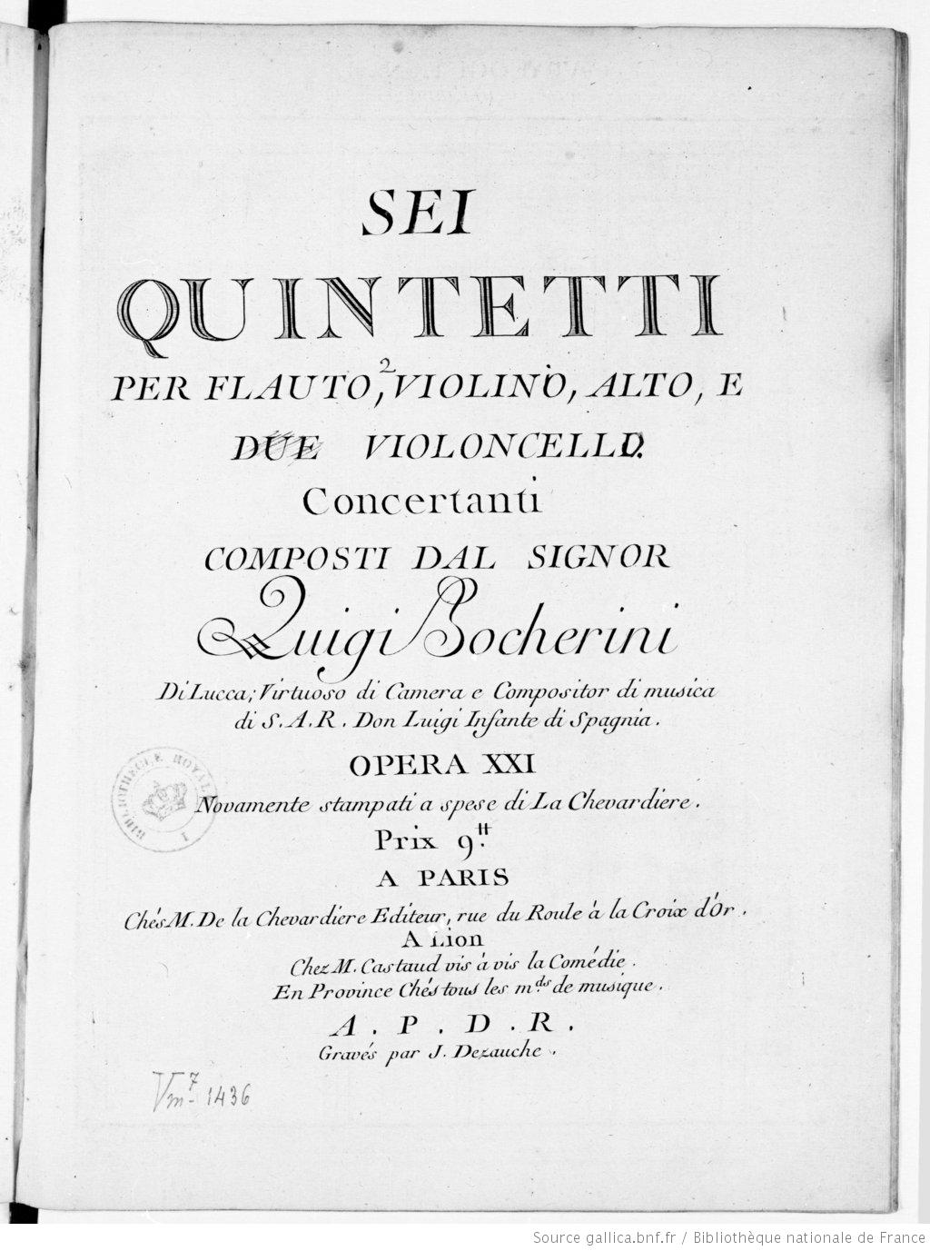 Page de titre de l'édition La Chevardière des quintettes avec flûte de L. Boccherini